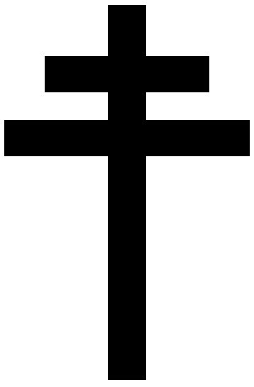 Eigen tekening